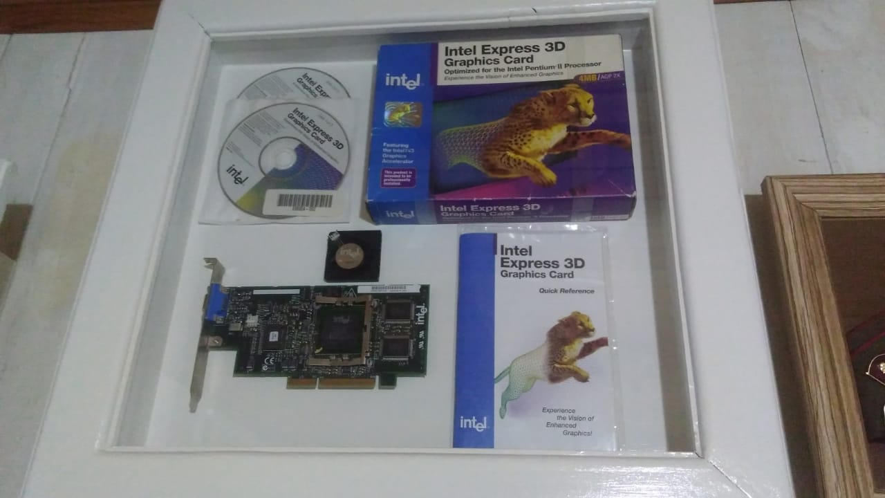 intel l740 4 mb en caja completa